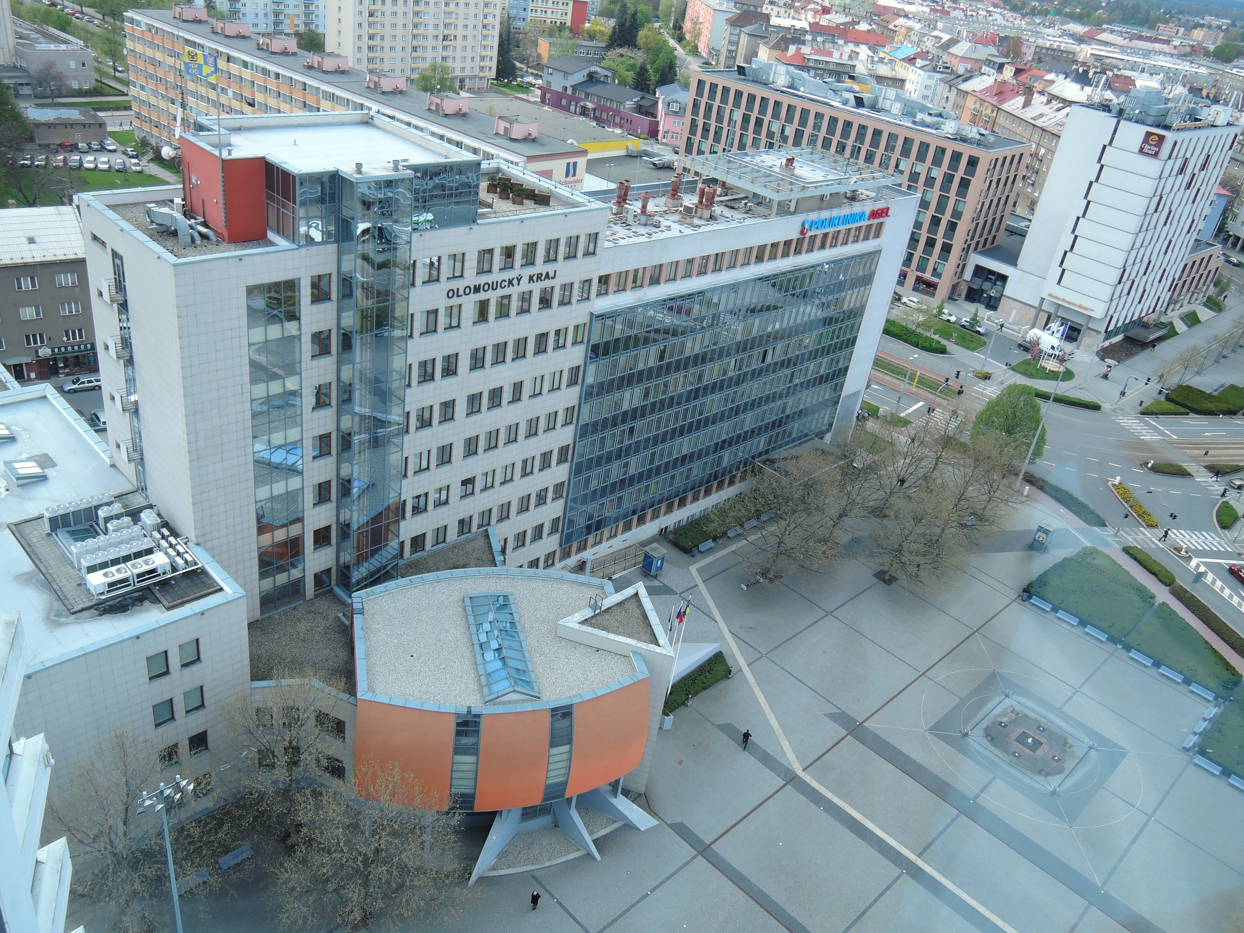 Olomouc, ulice Jeremenkova, Krajský úřad Olomouckého kraje